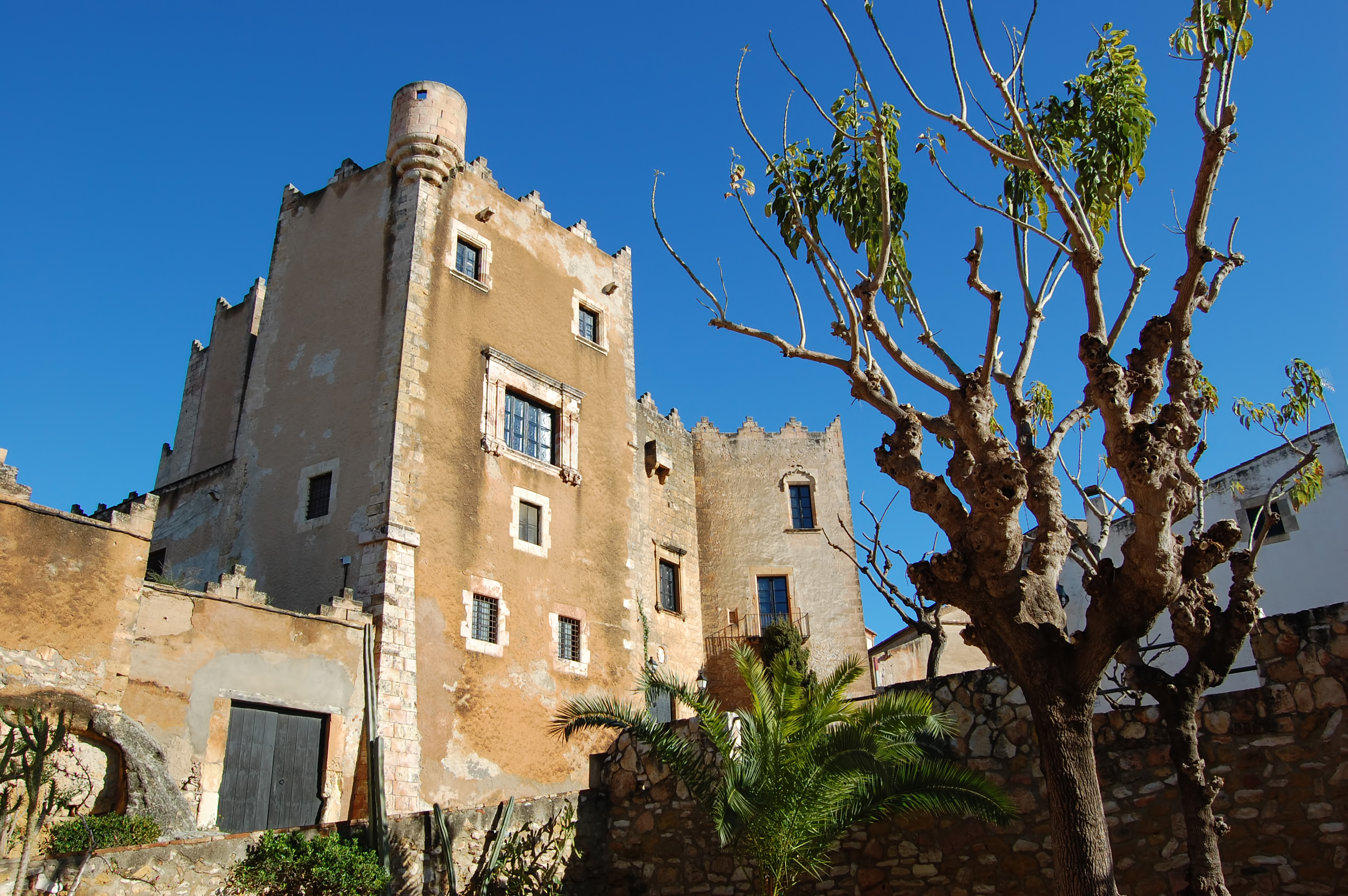 Castell d'Altafulla